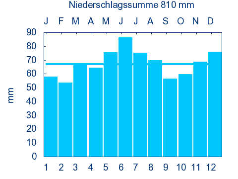 Mittelwerte von 1961 - 1990, generiert mit awk und gnuplot